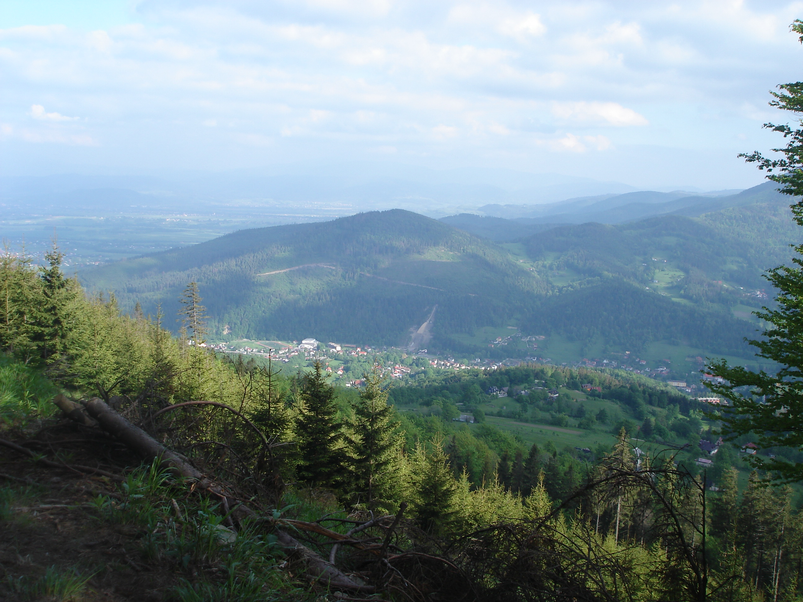 Widok z Klimczoka na Szczyrk